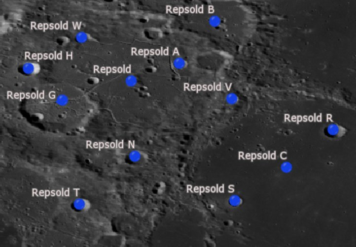 Cráter lunar Repsold. Cráteres satélite. (Imagen LRO)